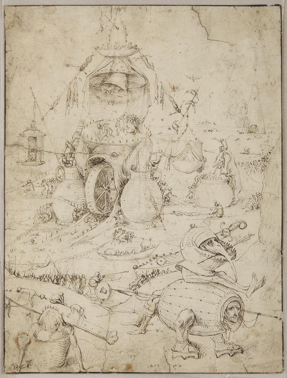 Dessin attribué à Jérôme Bosch en décembre 2015